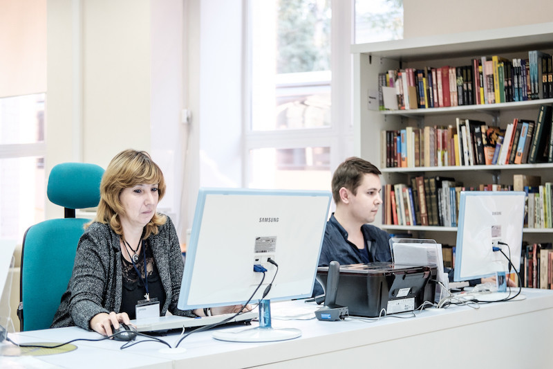 Государственное бюджетное учреждение культуры г. Москвы «Центральная универсальная научная библиотека имени Н.А. Некрасова» Главное здание Библиотеки им. Н.А. Некрасова 105005, Москва, ул. Бауманская, д. 58/25, стр. 14 (м. «Бауманская»)